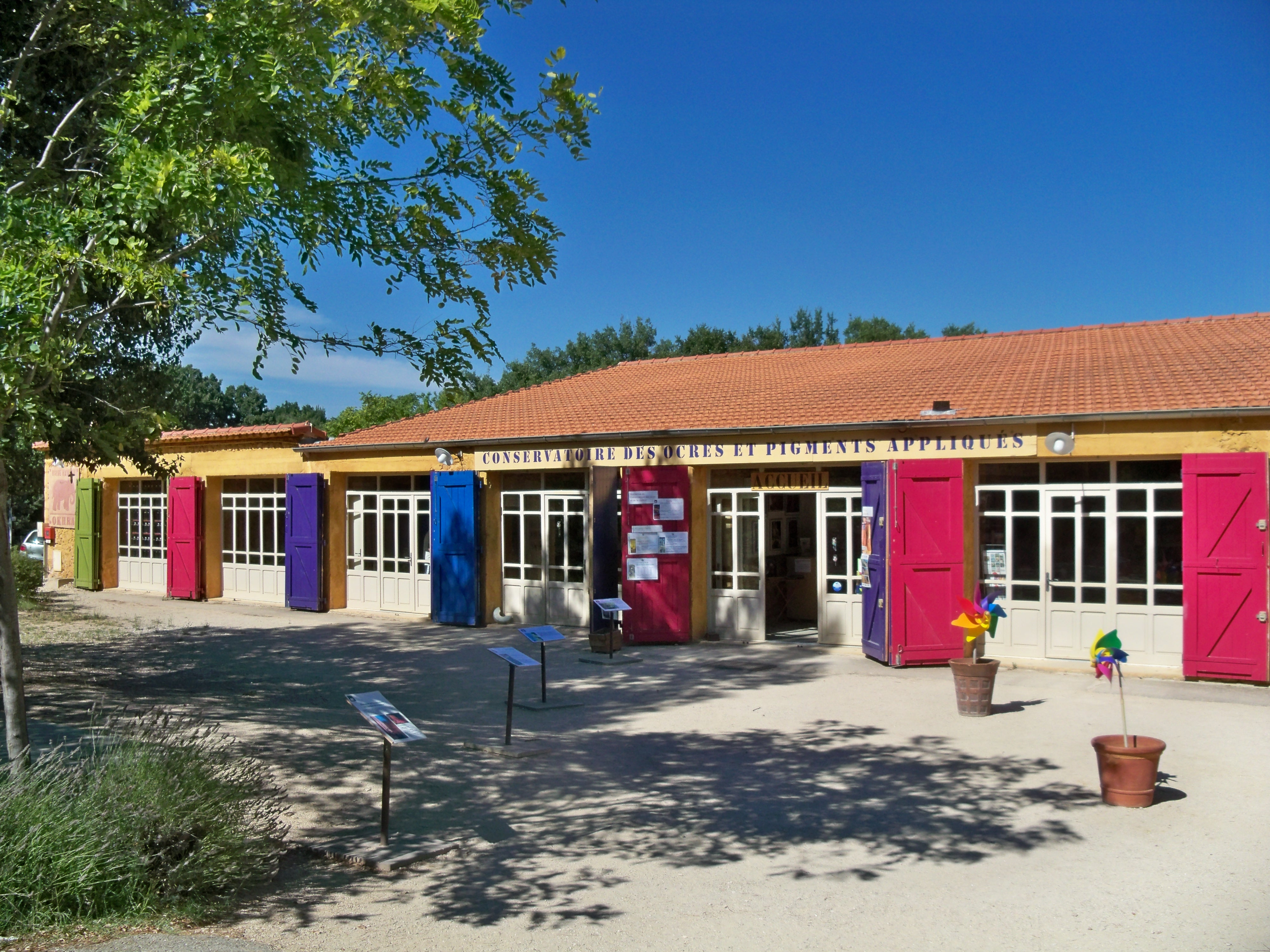 Conservatoire des ocres et pigments appliquésà Roussillon (Vaucluse)